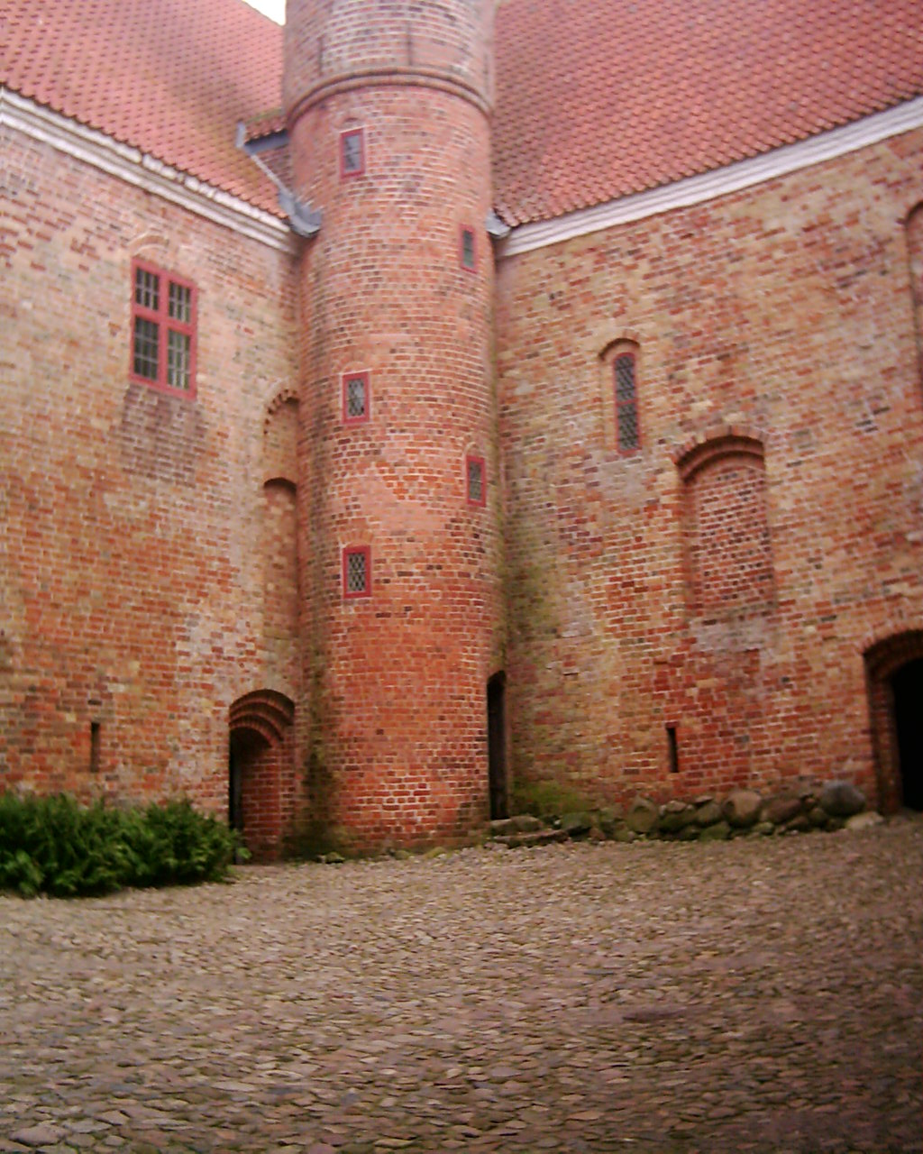 Spøttrup Borg